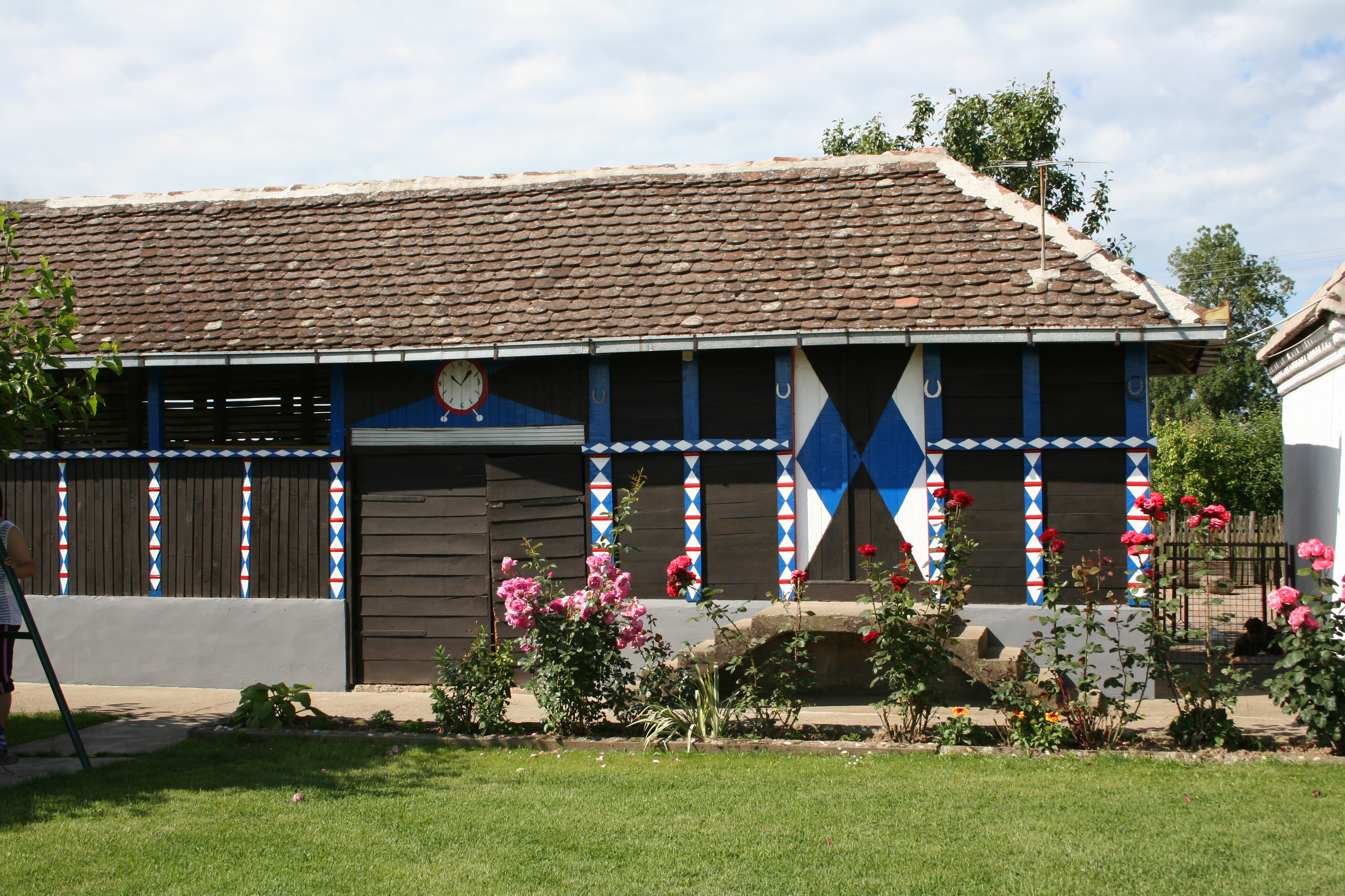 Vlasanica opština Vladimirci, seosko domaćinstvo